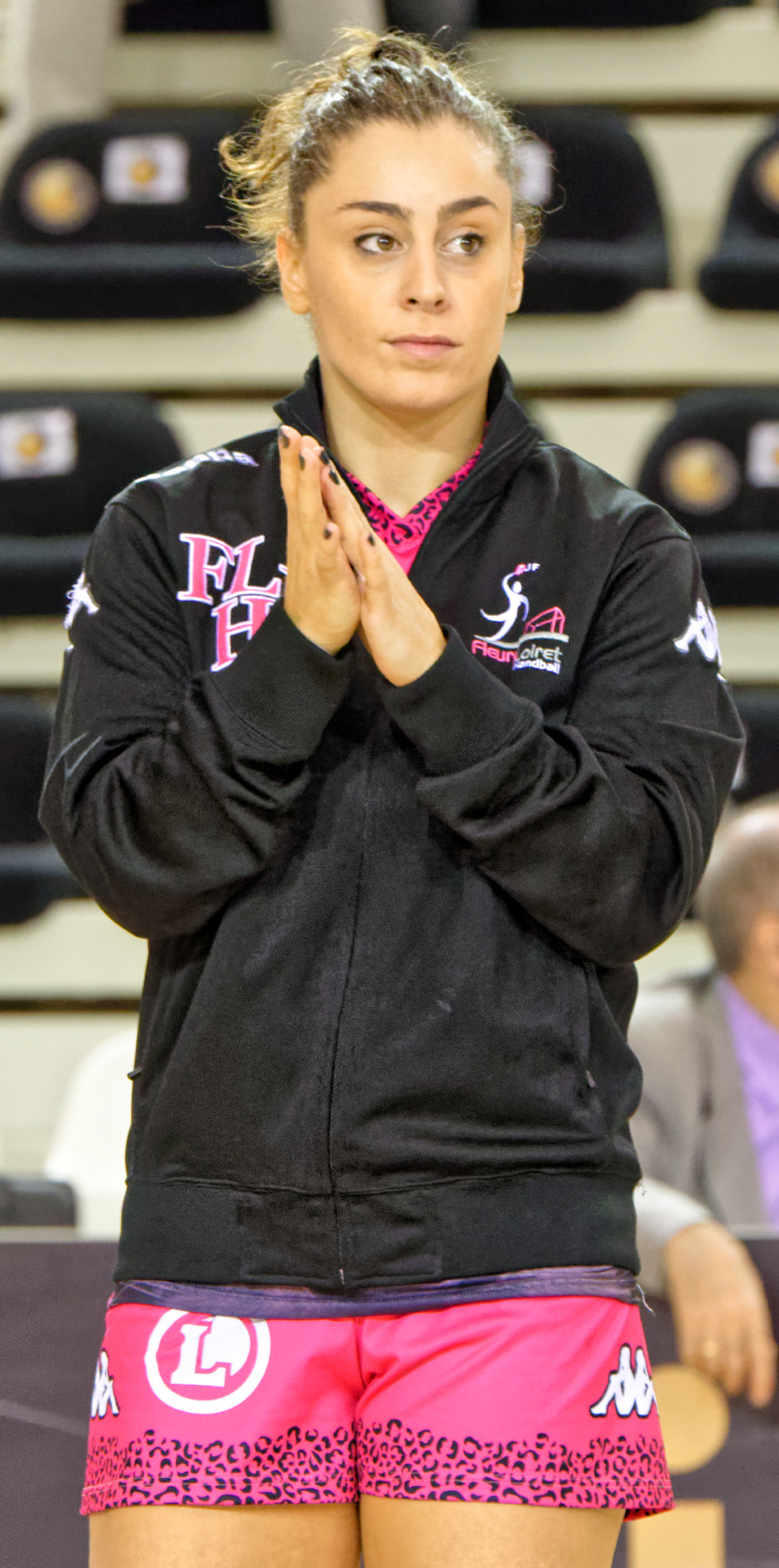 Rencontre de championnat entre Issy Paris Hand et fleury. A Issy Les Moulineaux, le 22 septembre 2015